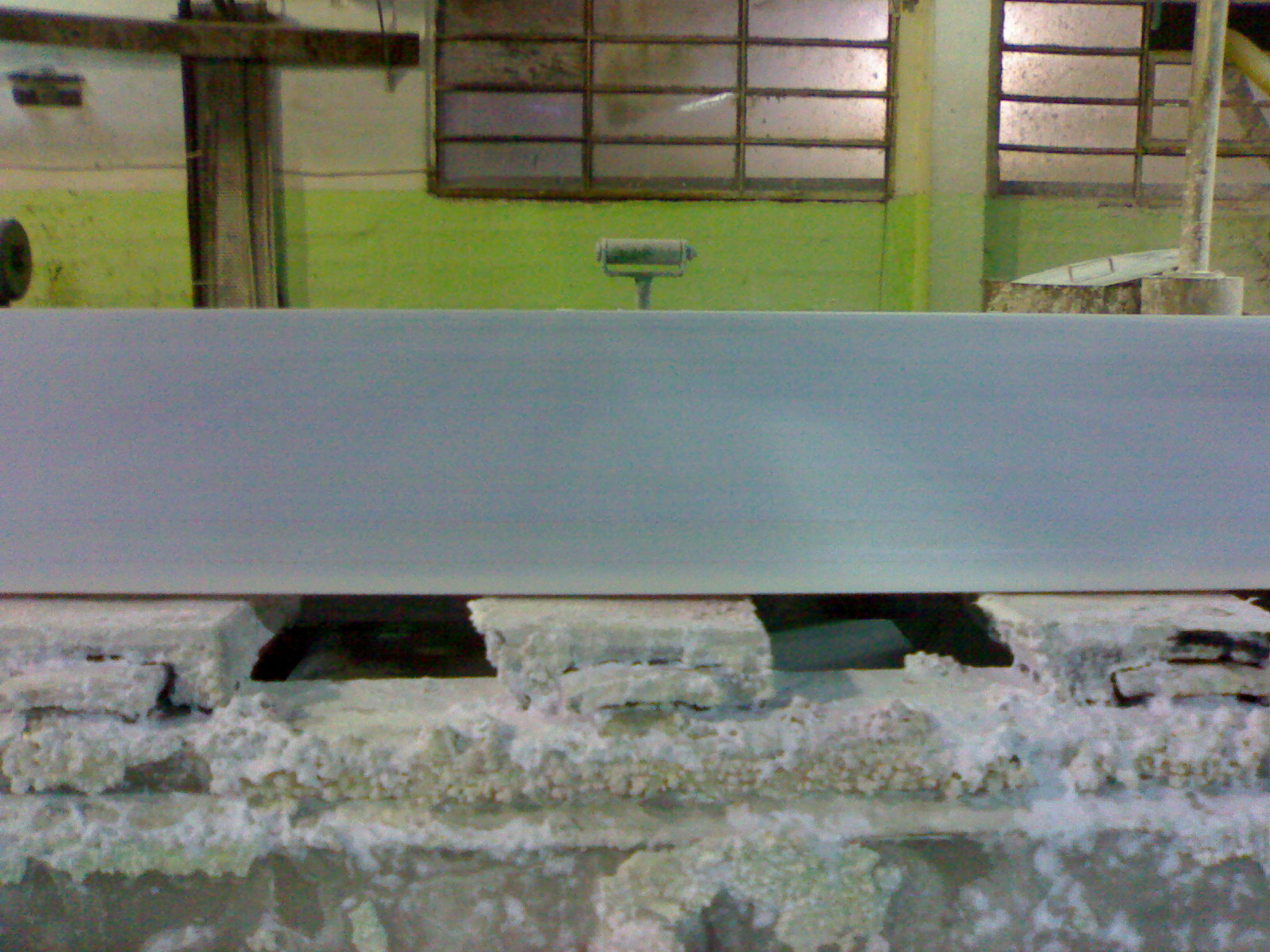 Foilds, ayudando al desgote del papel en mesa